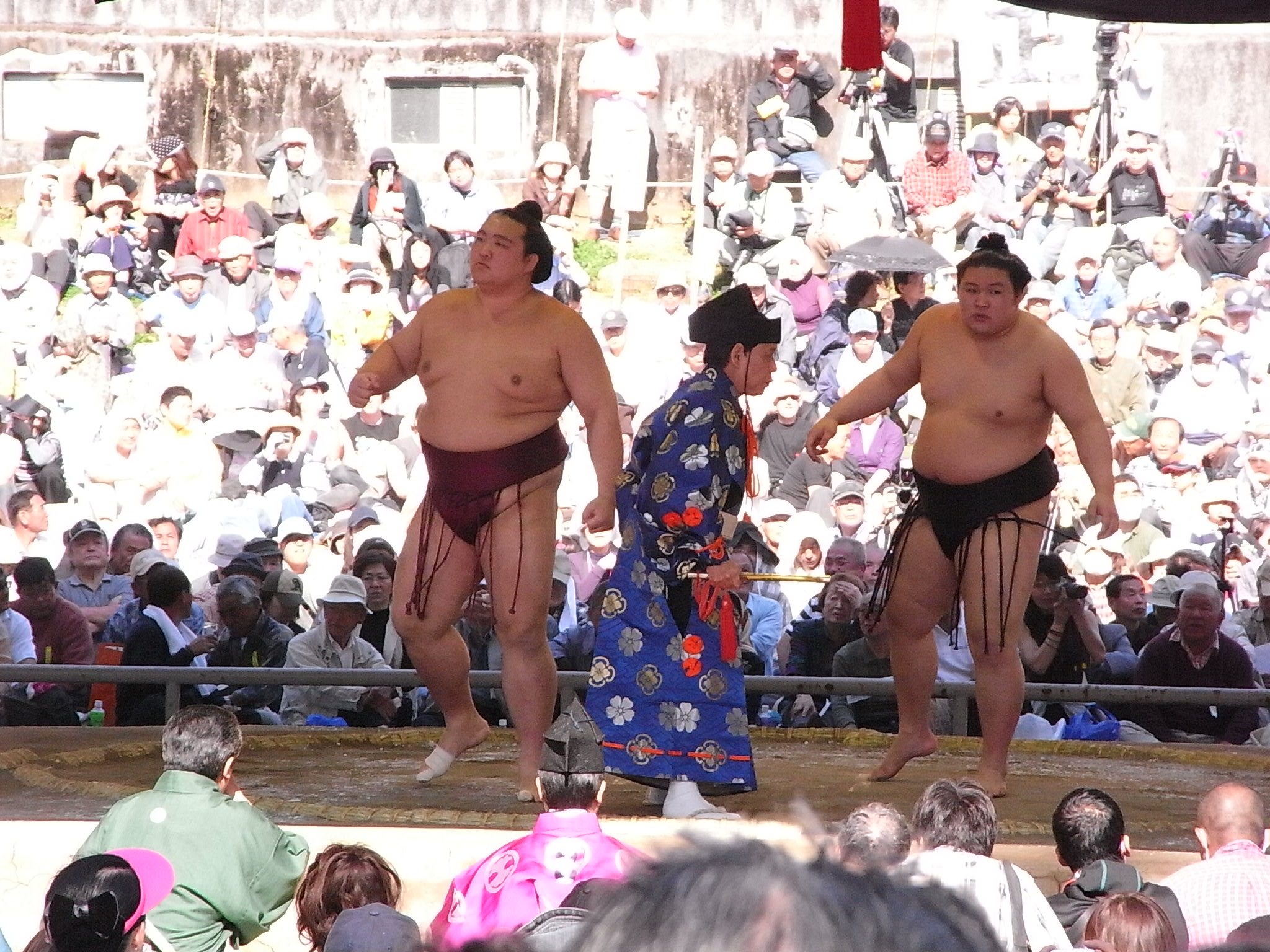 稀勢の里寛